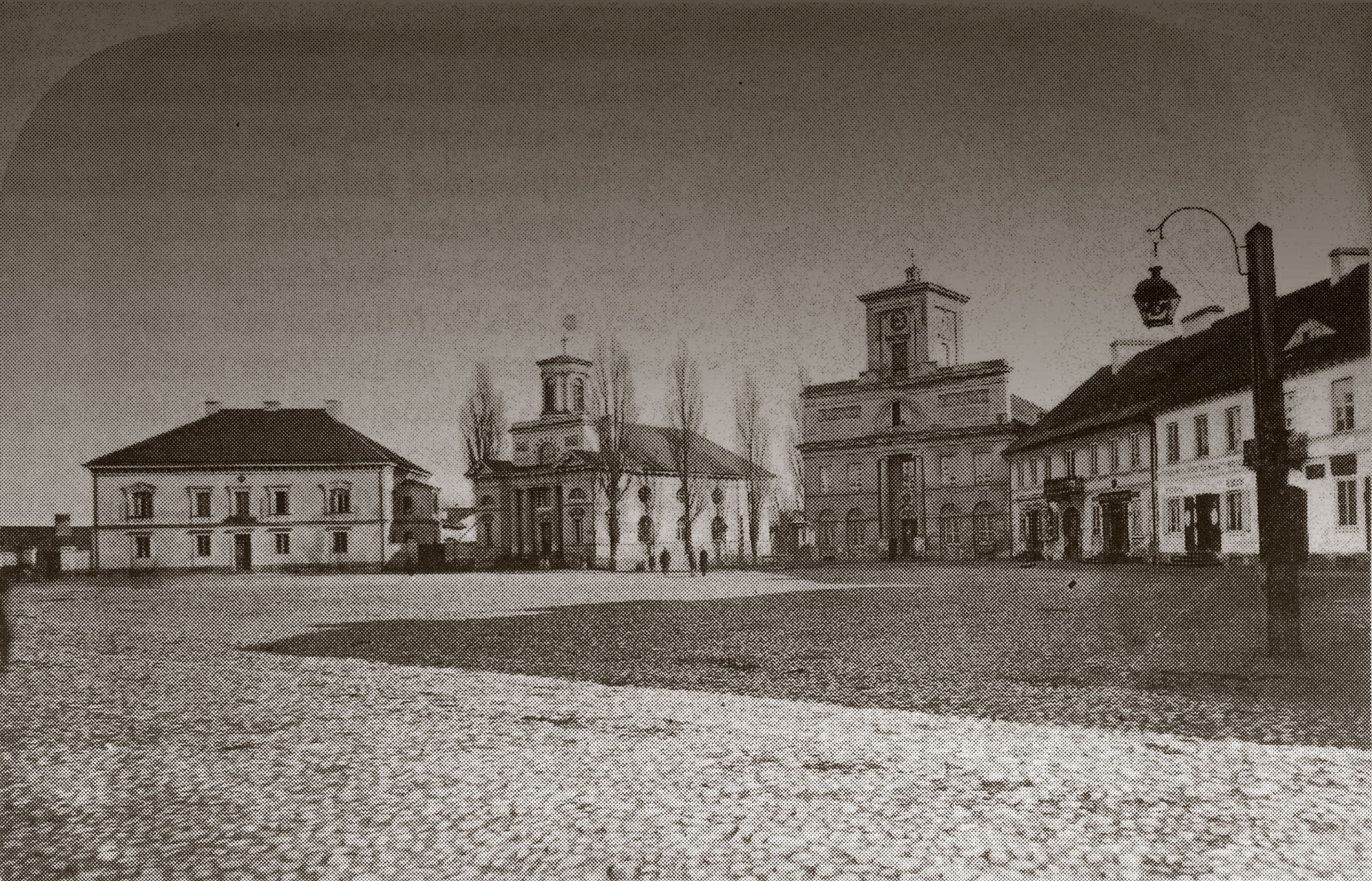 Grafika przedstawia Nowy Rynek (obecnie pl.Wolności) na której widoczny jest Ratusz Miejski i Kościół Ewangelicki. Z lewej strony widoczny budynek mieszczący szkołę powiatową realną niemiecko-ruską. Od 1869 w tym jednopiętrowym budynku umieszczono Łódzką Wyższą Szkołę Rzemieślniczą.